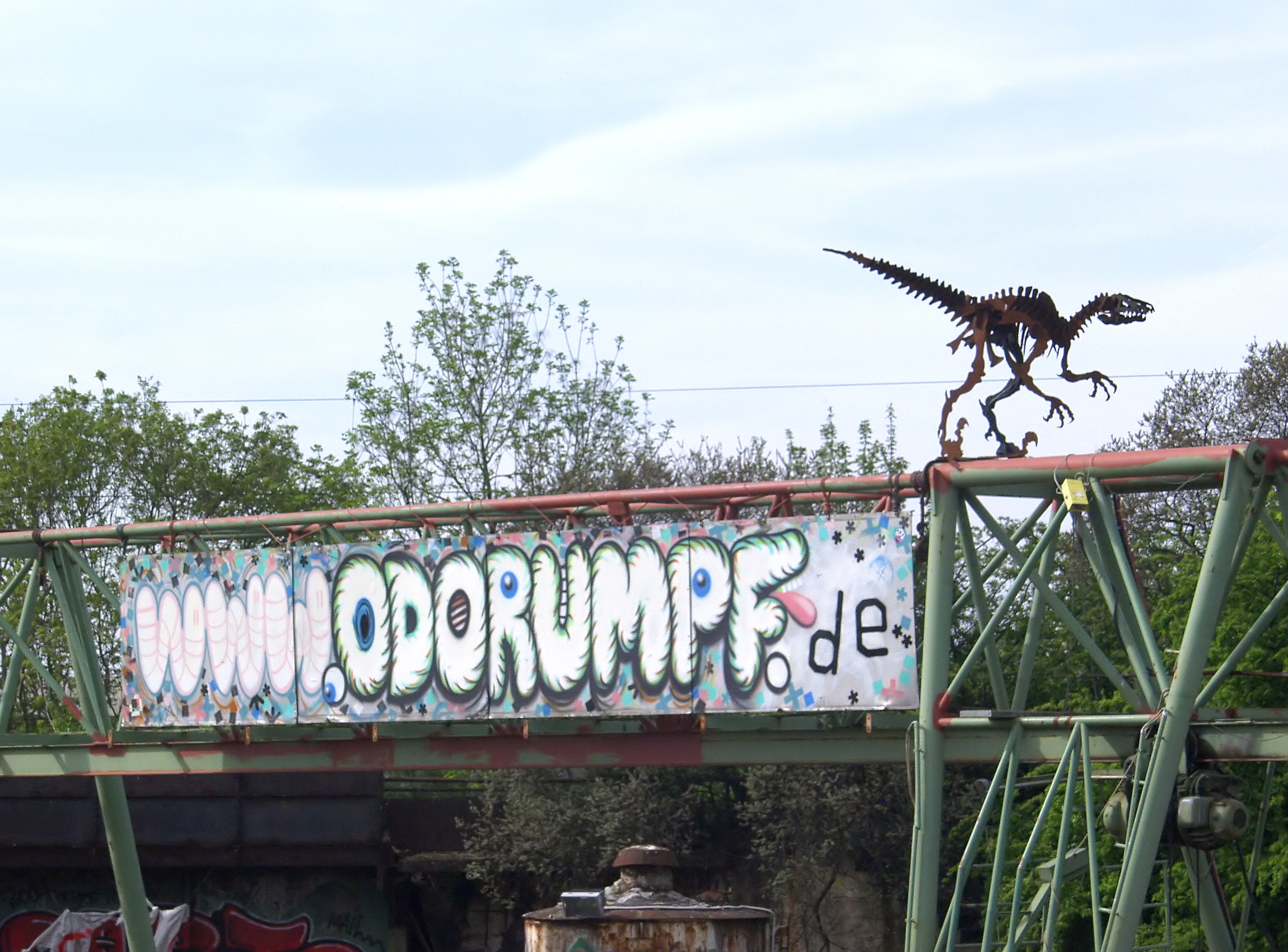 Metallsaurier in Odonien, dem Atelier von Odo Rumpf